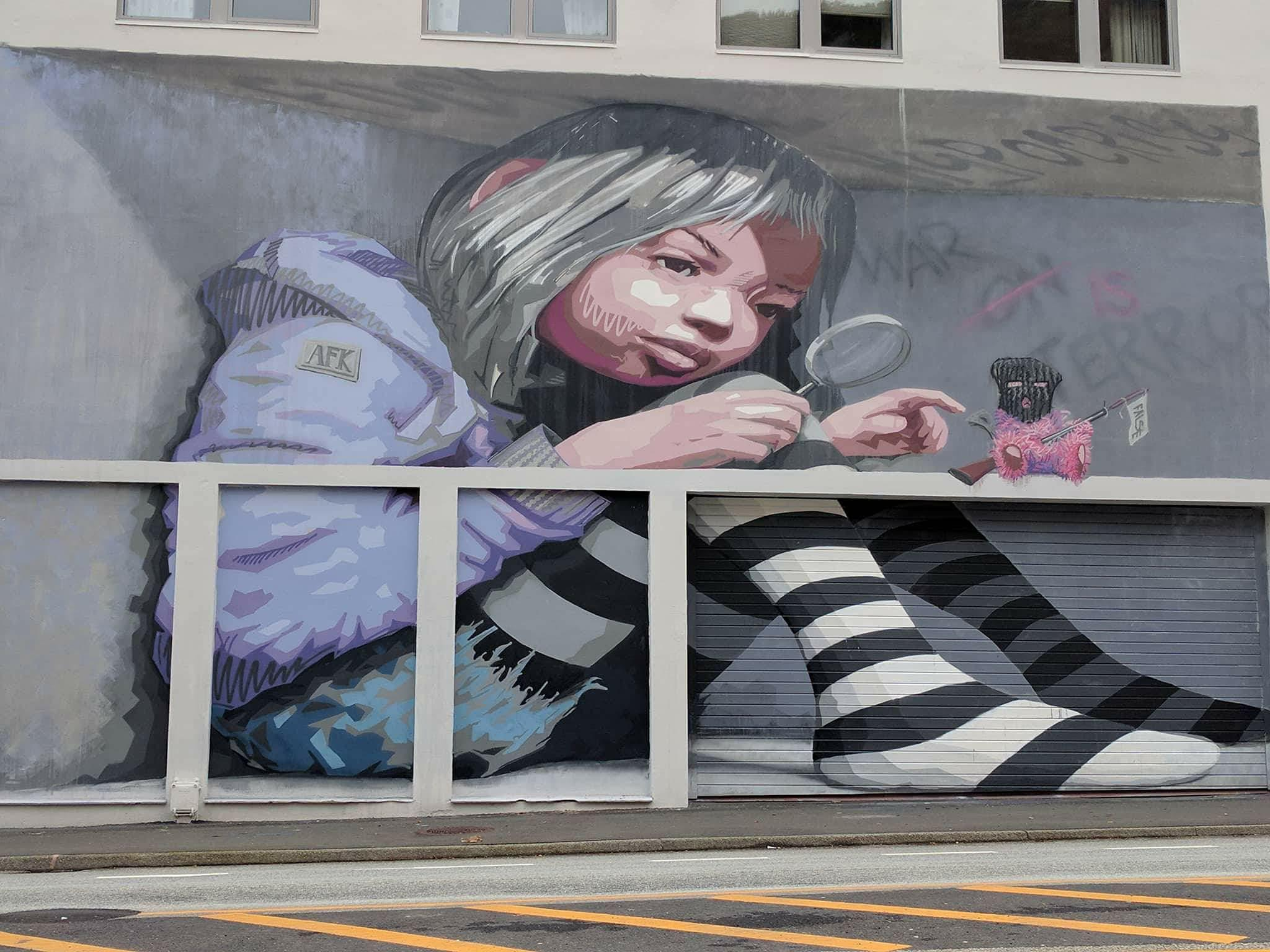 Piece laget av AFK ifm. sykkel-VM i Bergen 2017.